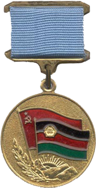 Медаль "От благодарного афганского народа"